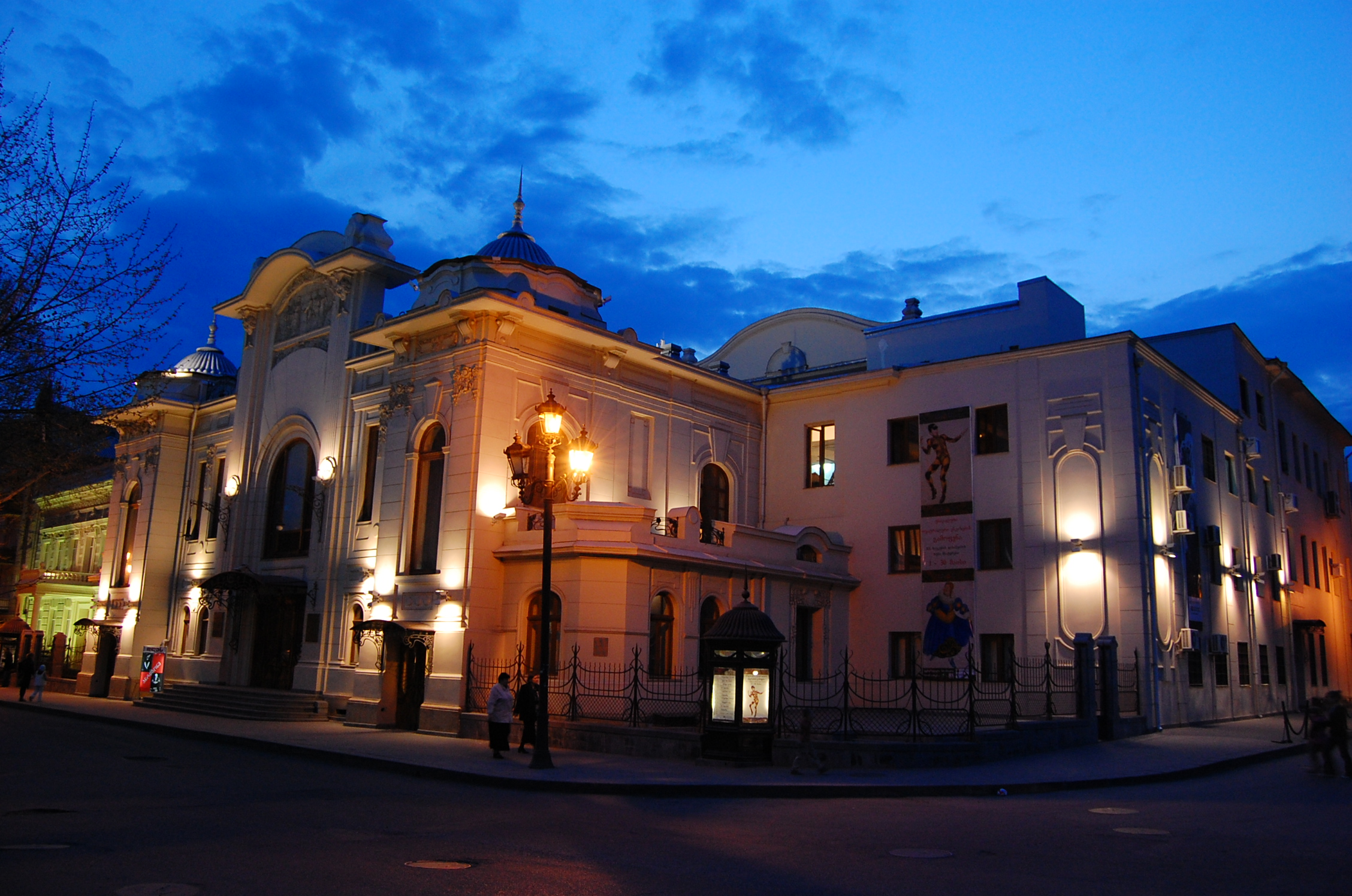 რესტავრირებული ქუთაისი